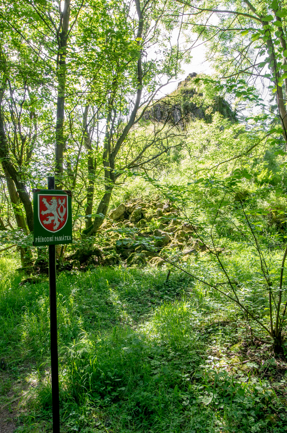 Přírodní památka Homolka, Chodov u Bečova nad Teplou, Slavkovský les, okres Karlovy Vary